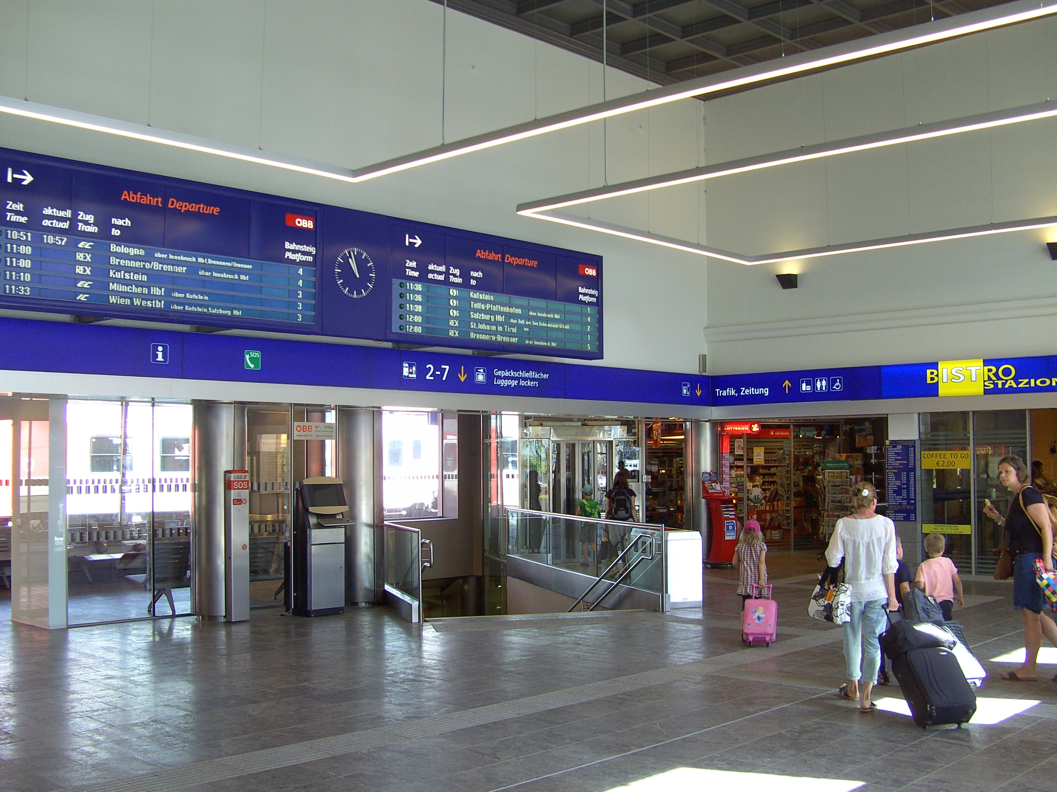 Wörgl Hauptbahnhof - Abfahrtshalle 2015 (1)